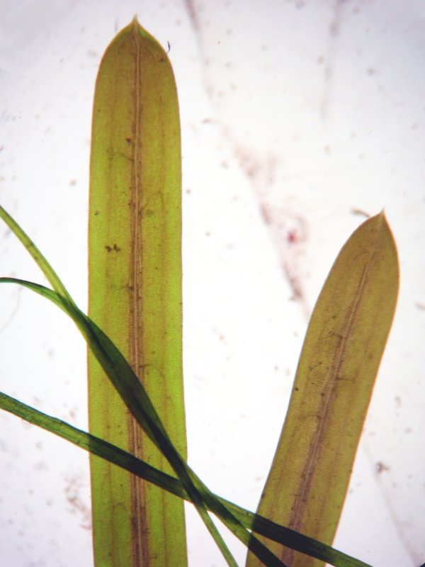 Stachelspitziges Laichkraut Potamogeton friesii, Müritz-Gebiet